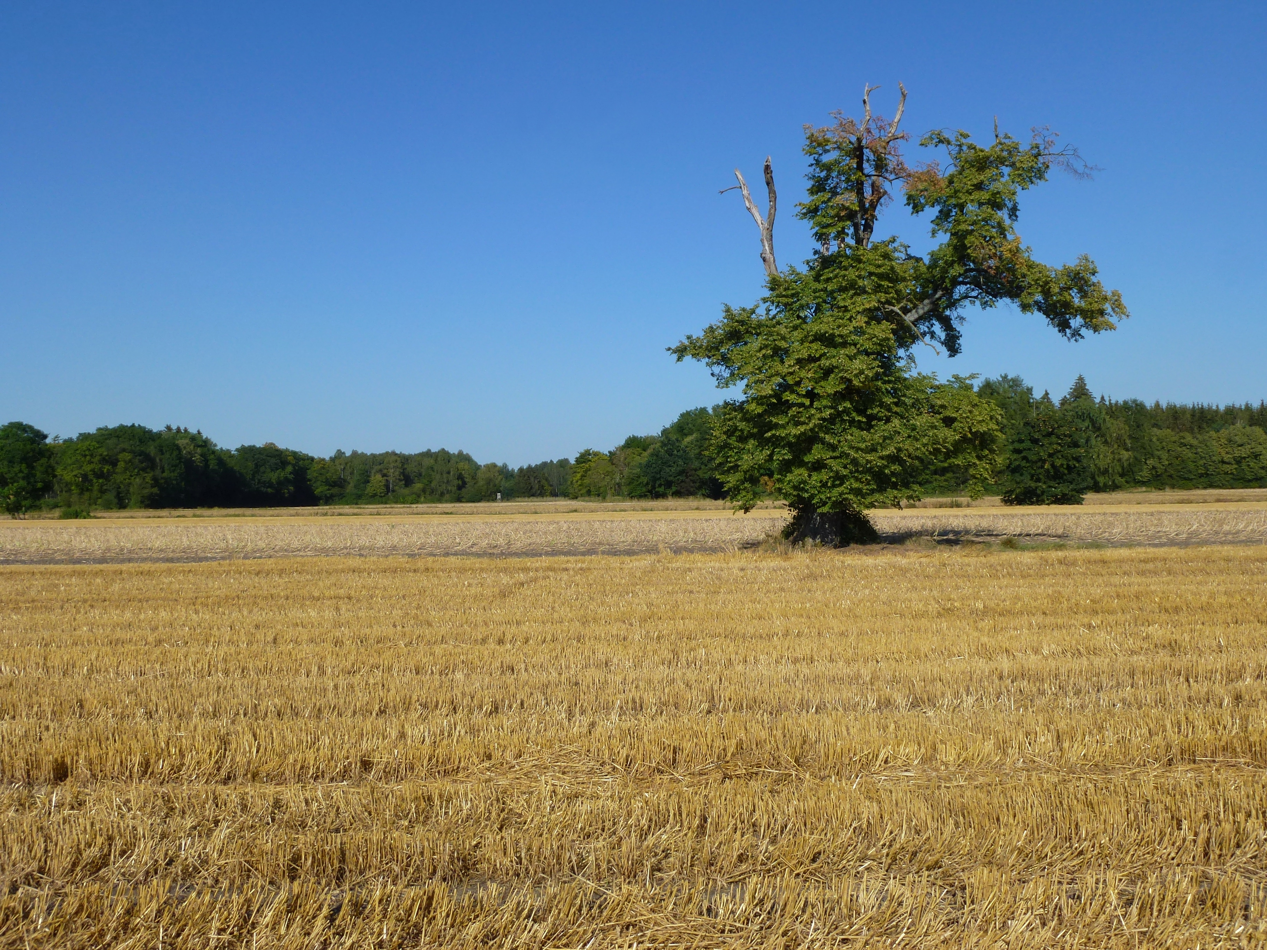 LSG Triftwiesen Germering (LKR Fürstenfeldbruck). 48,147381 N / 11,375362 O, Aufnahmerichtung nach O